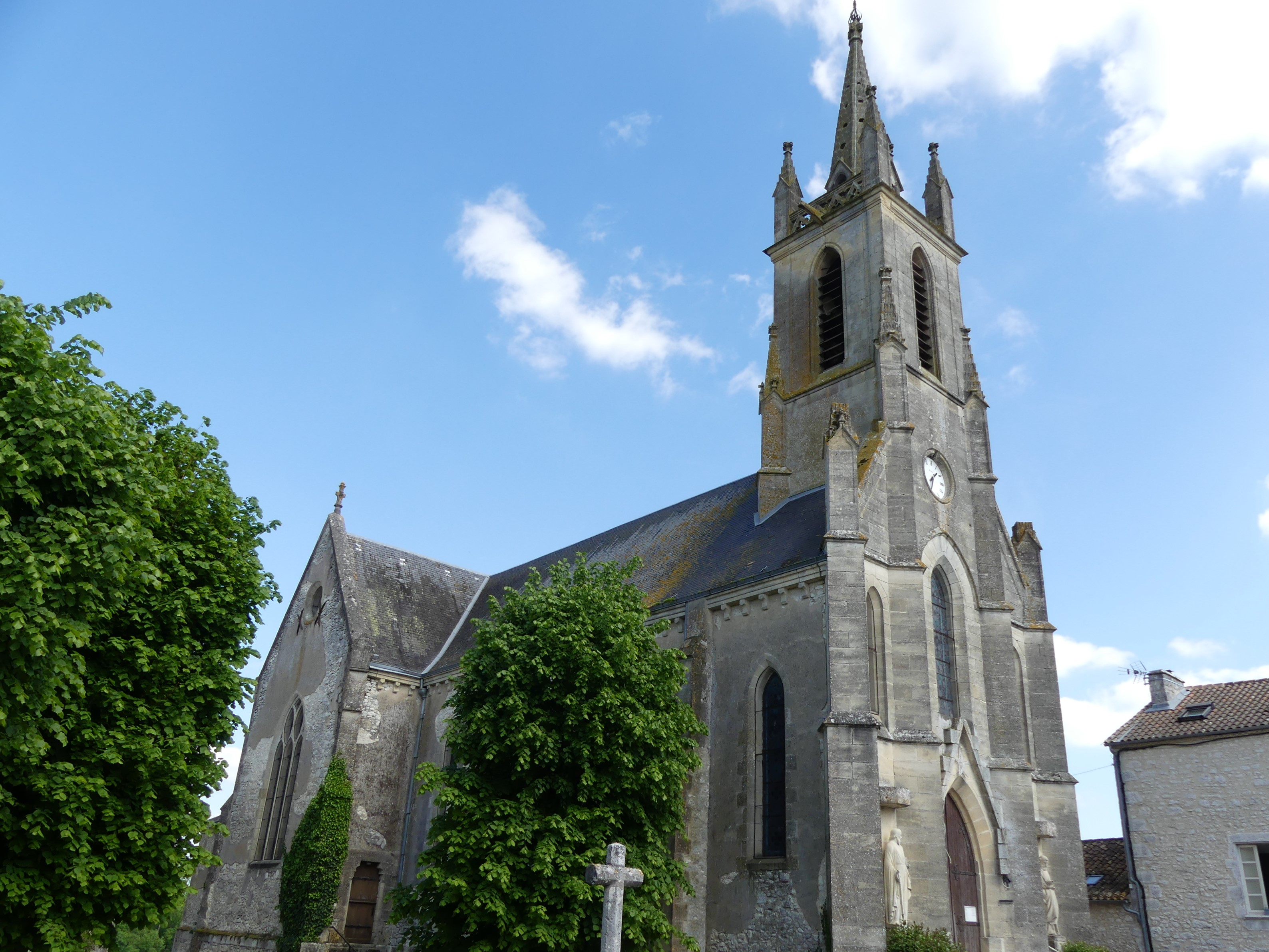 L'église de Bouniagues, Dordogne, France.